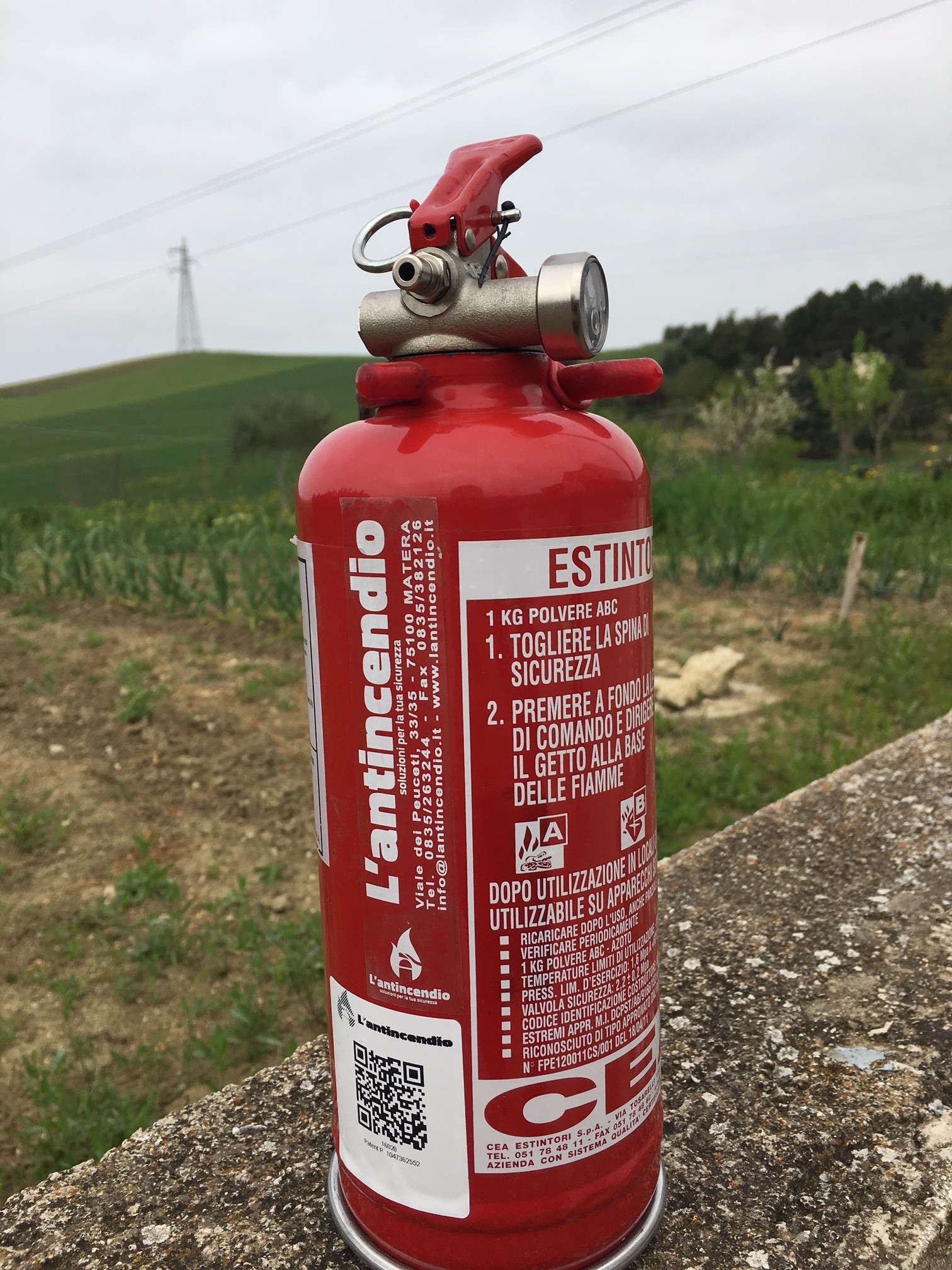 Estintore portatile da auto dotato di interfaccia qr-code (Internet of Things) L'Antincendio